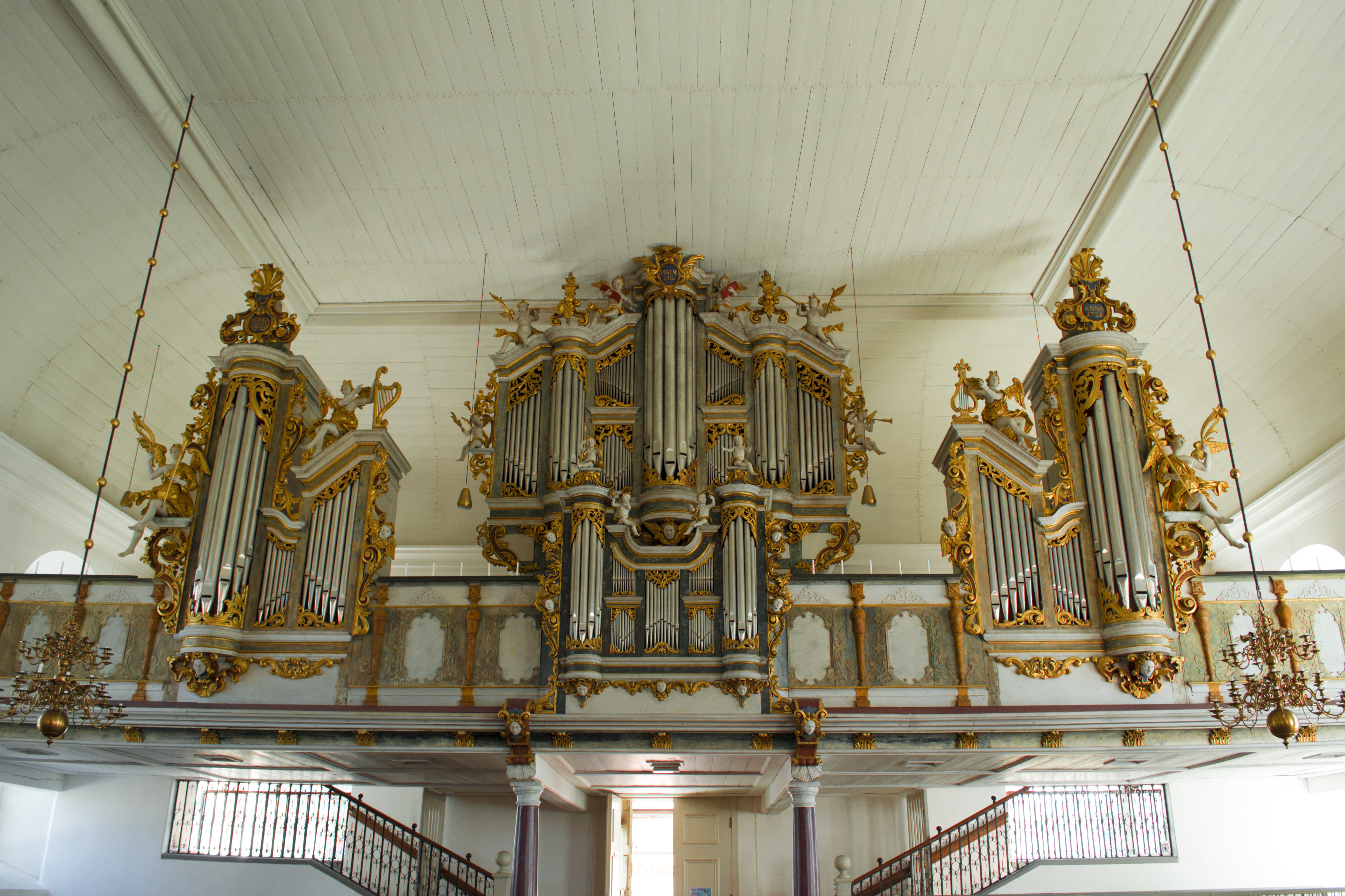 En bild på Cahmanorgeln i Lövstabruks kyrka.